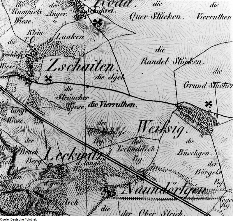 Original image description from the Deutsche Fotothek Nünchritz-Weißig. Oberreit, Sect. Oschatz, 1839/40